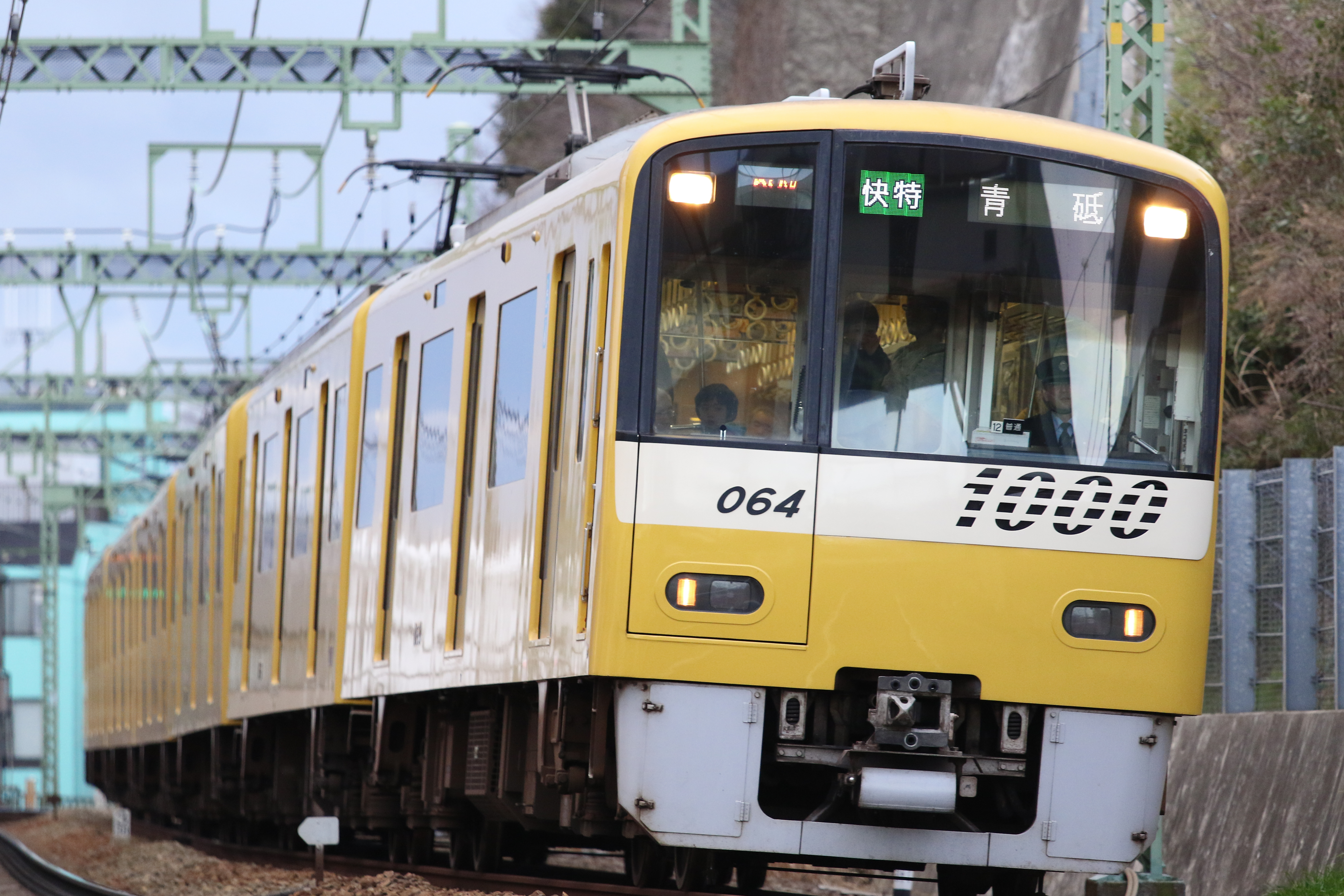 京急イエローハッピートレイン。子供たちのハッピーを乗せて。